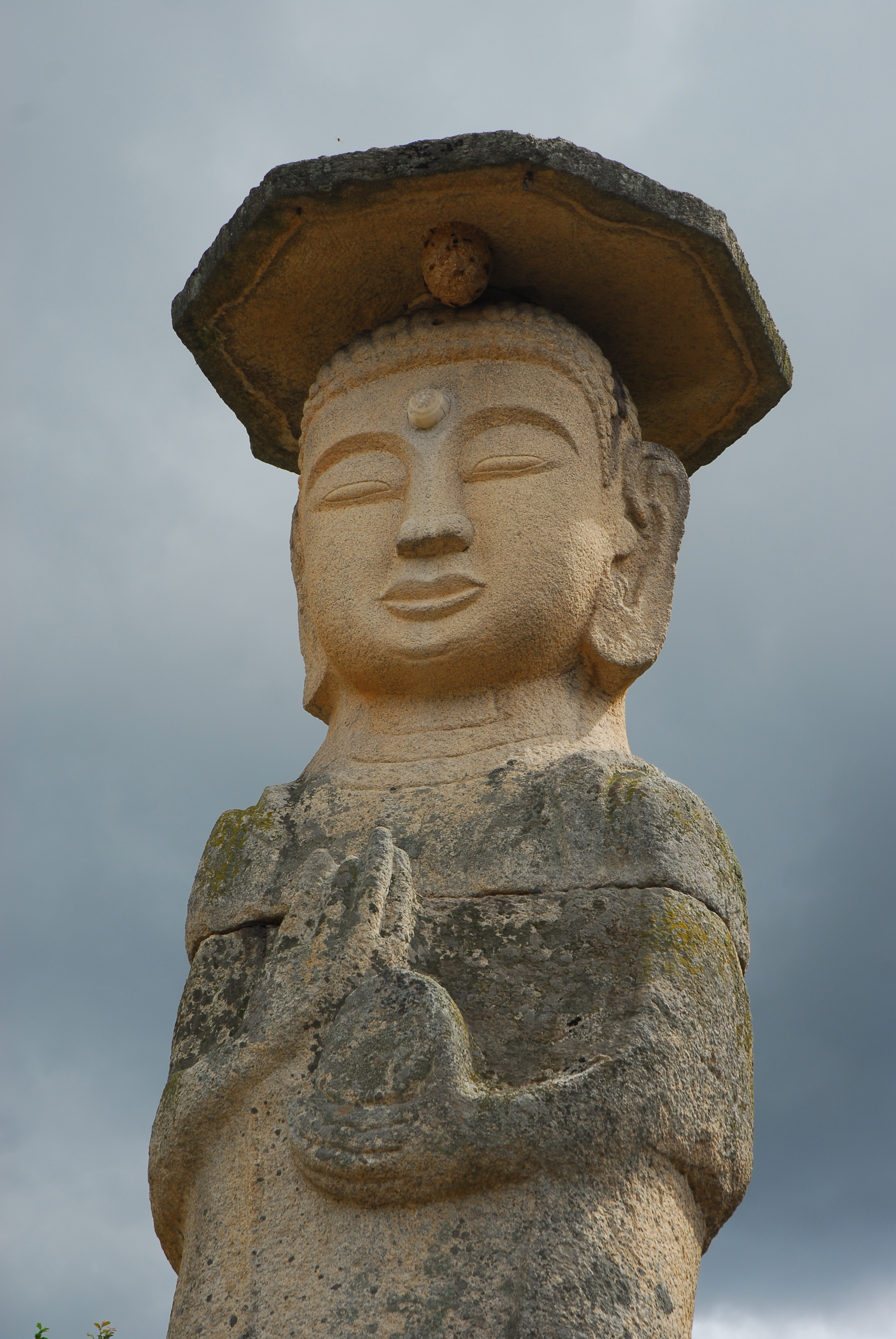 미륵리 석조여래입상